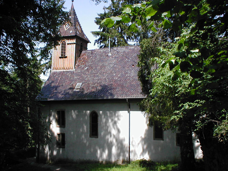 Burgkapelle von Burg Guttenberg, nachgewiesen seit dem 14. Jhd und erstmals erbaut durch einen Engelhard von Weinsberg, in heutiger Form erbaut durch Herren von Gemmingen 1471 und mehrmals renoviert